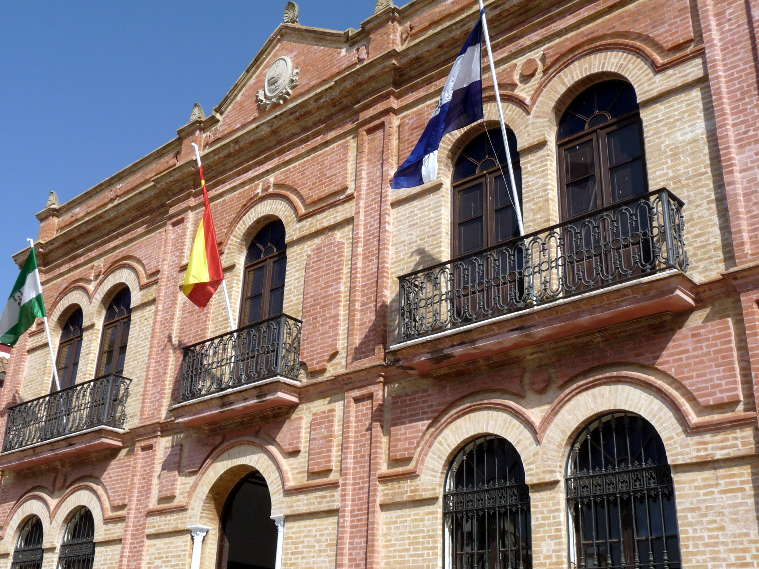 Ayuntamiento de San Juan del Puerto (provincia de Huelva, España).